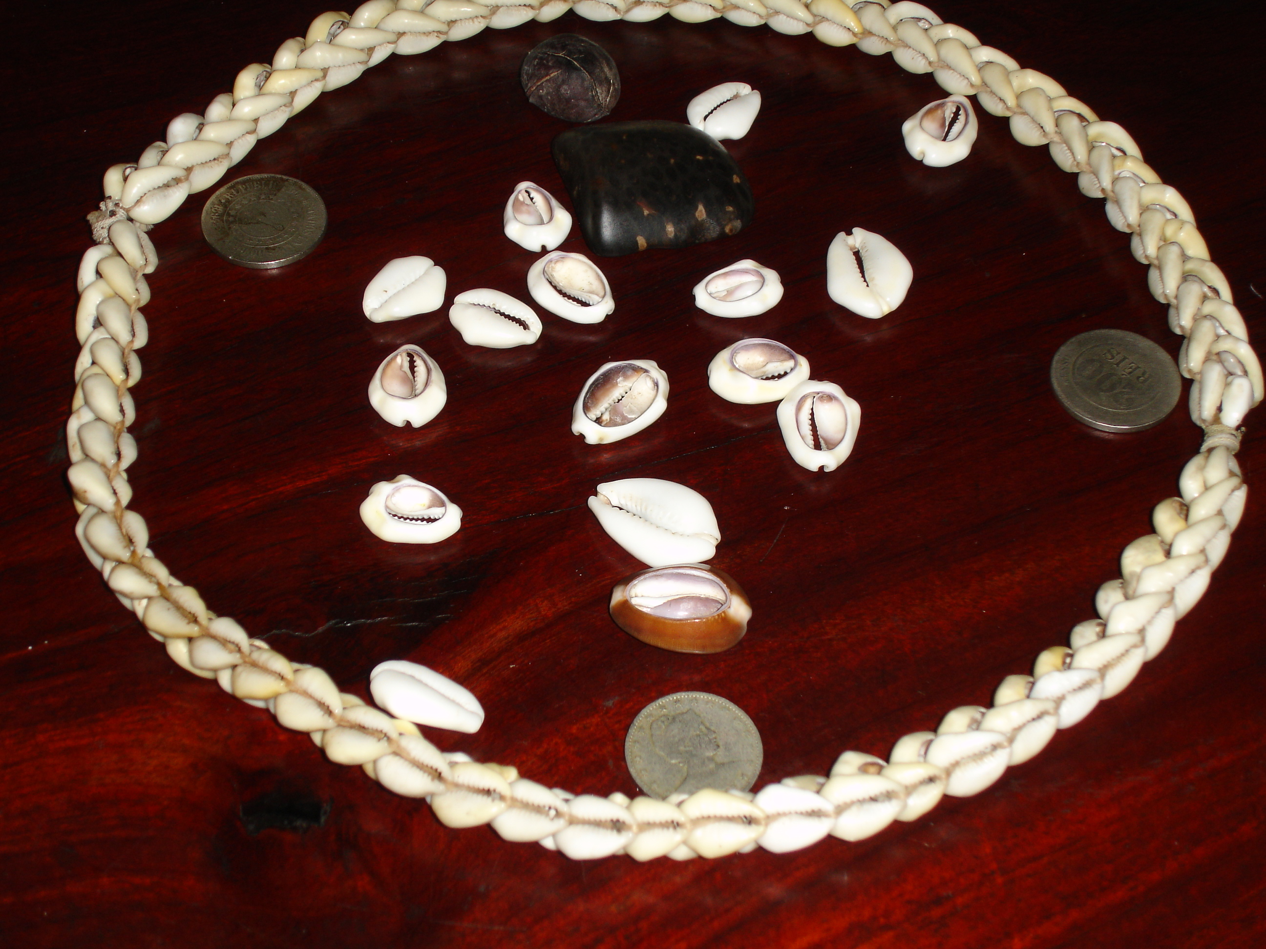 Meridilogun, Jogo de búzios